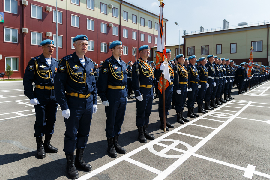 Вручение ордена Суворова 7-й гвардейской десантно-штурмовой (горной) дивизии